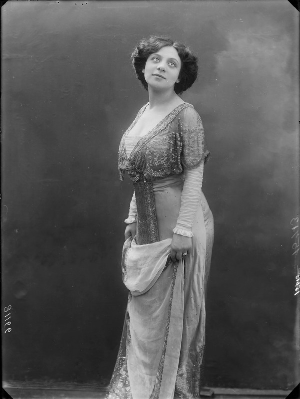 Maria Melato, attrice